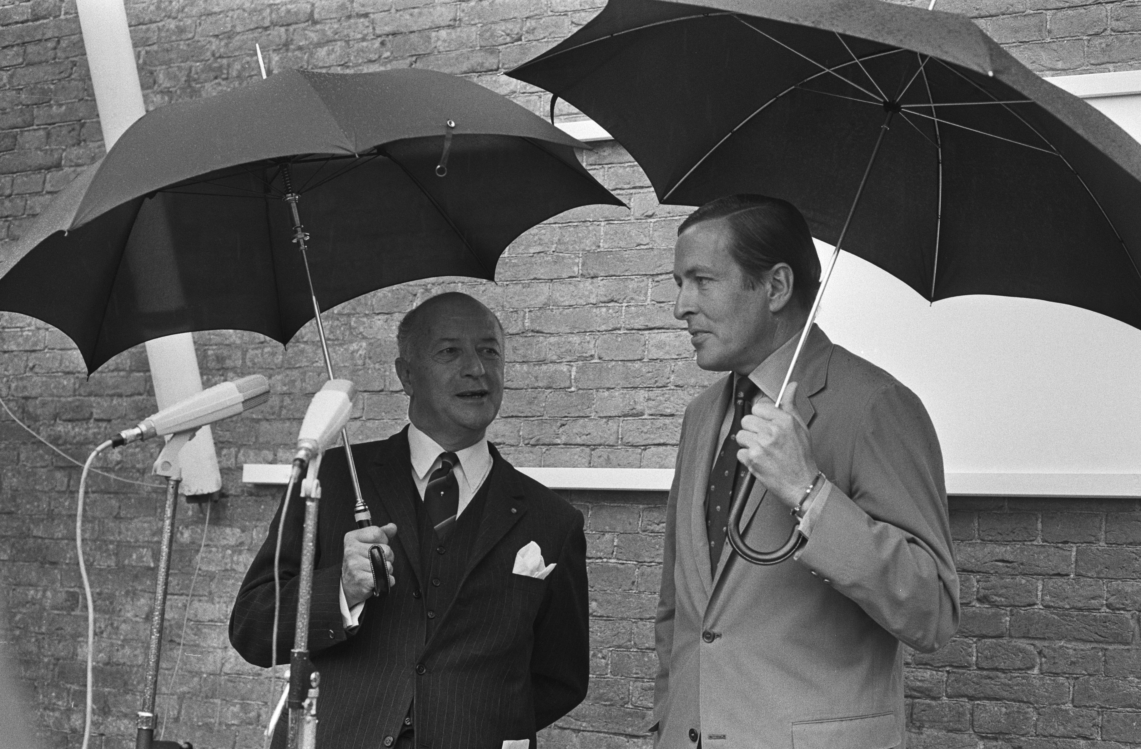 Collectie / Archief : Fotocollectie Anefo Reportage / Serie : Prins Claus geeft het startsein voor "Woudrichems Herstel" in Woudrichem Beschrijving : Prins Claus (r) en burgemeester Voster Datum : 14 mei 1971 Locatie : Noord-Brabant, Woudrichem Trefwoorden : burgemeesters, paraplu's, prinsen, regen Persoonsnaam : Claus, prins, Voster, L.M. Instellingsnaam : Waterpoort Fotograaf : Fotograaf Onbekend / Anefo Auteursrechthebbende : Nationaal Archief Materiaalsoort : Negatief (zwart/wit) Nummer archiefinventaris : bekijk toegang 2.24.01.05 Bestanddeelnummer : 924-5537